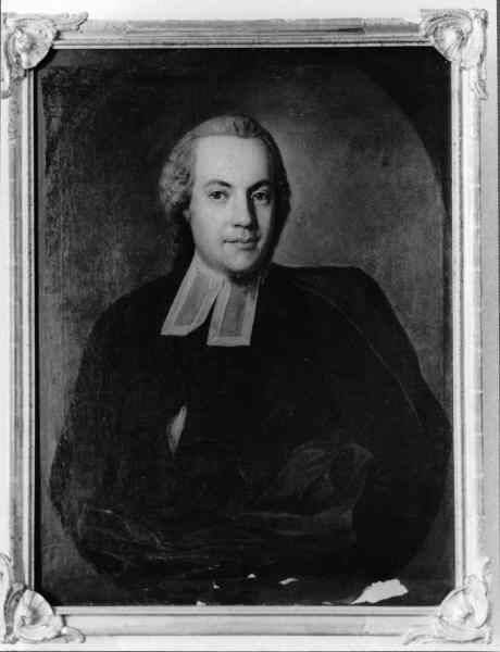 Porträtt av Georg Gezelius, kyrkoherde i Lillkyrka 1767-89. Troligen målat av J. H. Scheffel. Kategori: (09) PorträttPorträtt av Georg Gezelius, kyrkoherde i Lillkyrka 1767-89. Troligen målat av J. H. Scheffel.